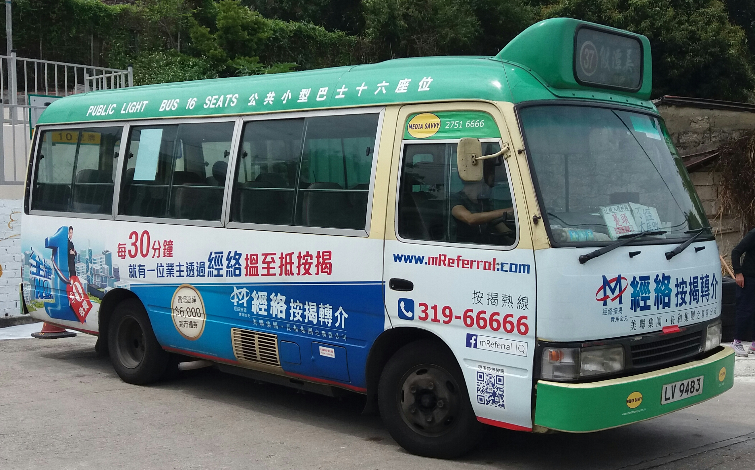 中文（香港）: 新界專線小巴37線每天上午設有來往攸潭美南的特別班次。